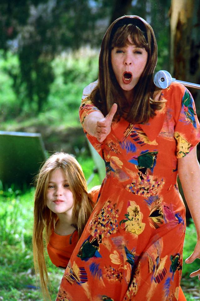 בר רפאלי עם הדוגמנית חלי גולדנברג מצטלמת לפרסומת למילקי